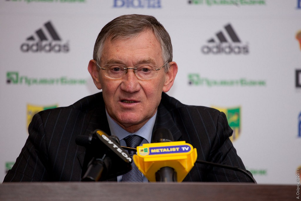 Семен Альтман